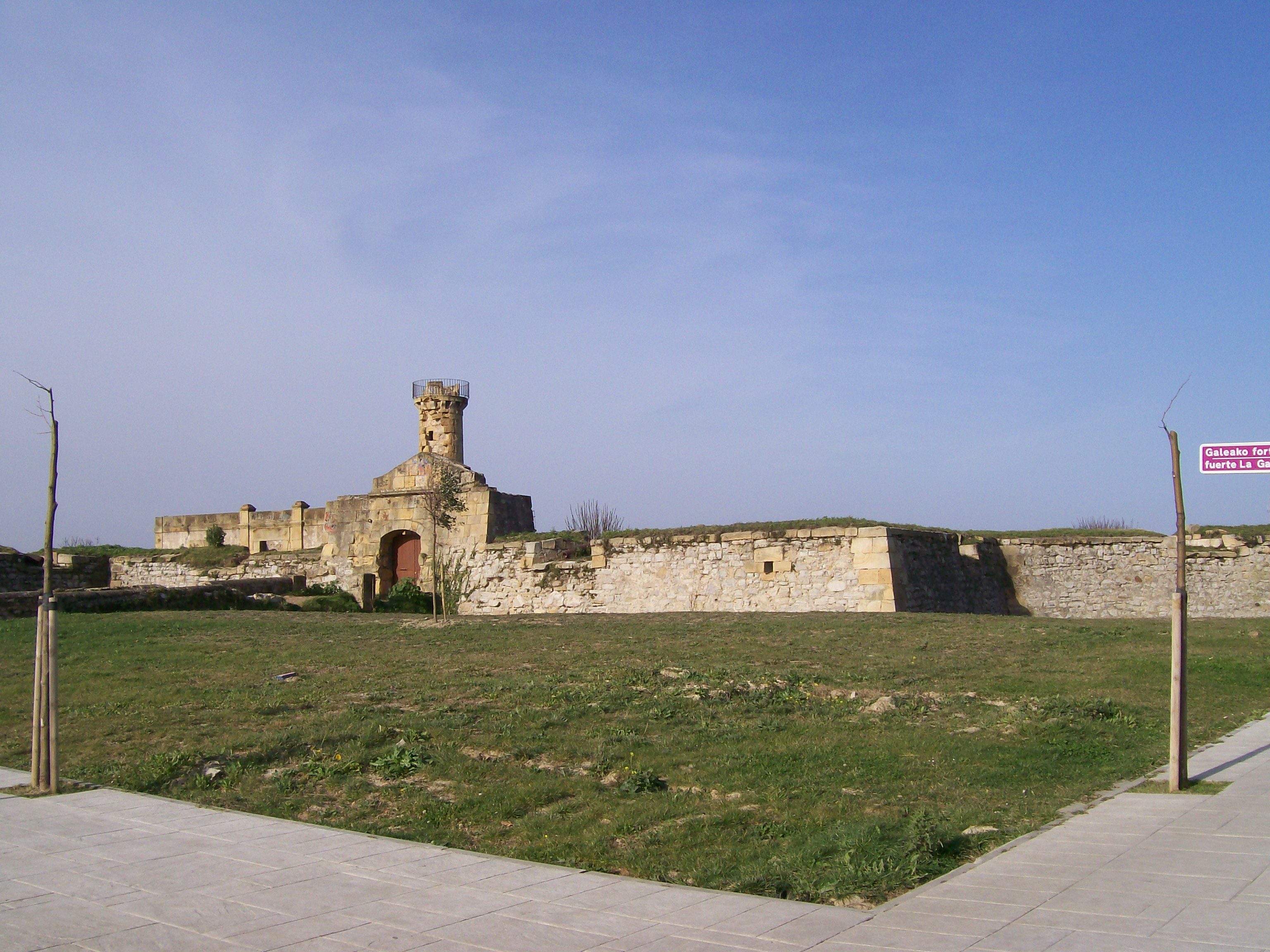 Galeako fortea